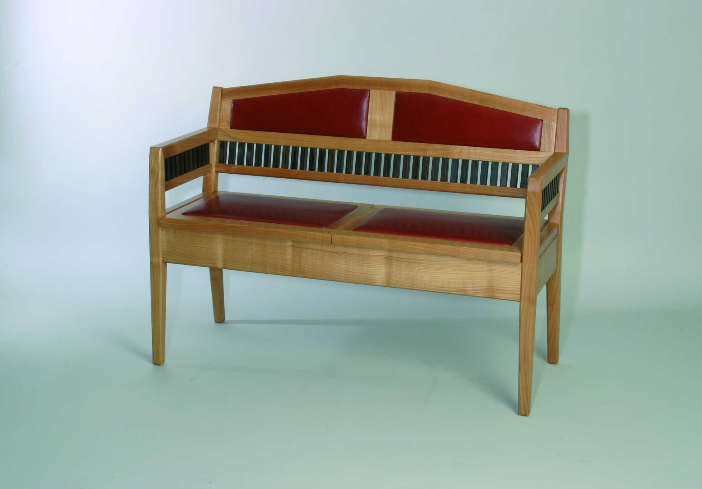 Sitzmöbel: Bank, Gesellenstück